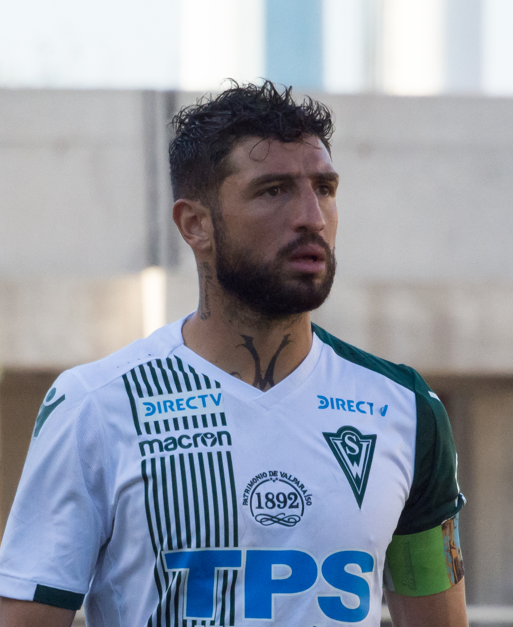 Mauricio Viana, San Luis v Santiago Wanderers, Estadio Municipal Lucio Fariña Fernández, Quillota, Región de Valparaíso, Chile.